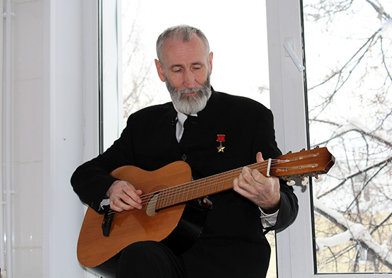 Герой Советского Союза Валерий Бурков в гостях у курсантов Челябинского филиала ВУНЦ ВВС